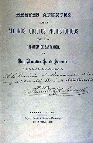 Portada de la obra Breves apuntes sobre algunos objetos prehistóricos de la provincia de Santander donde M. S. Sautuola dio a conocer el descubrimiento de las pinturas Paleolíticas de la Cueva de Altamira.